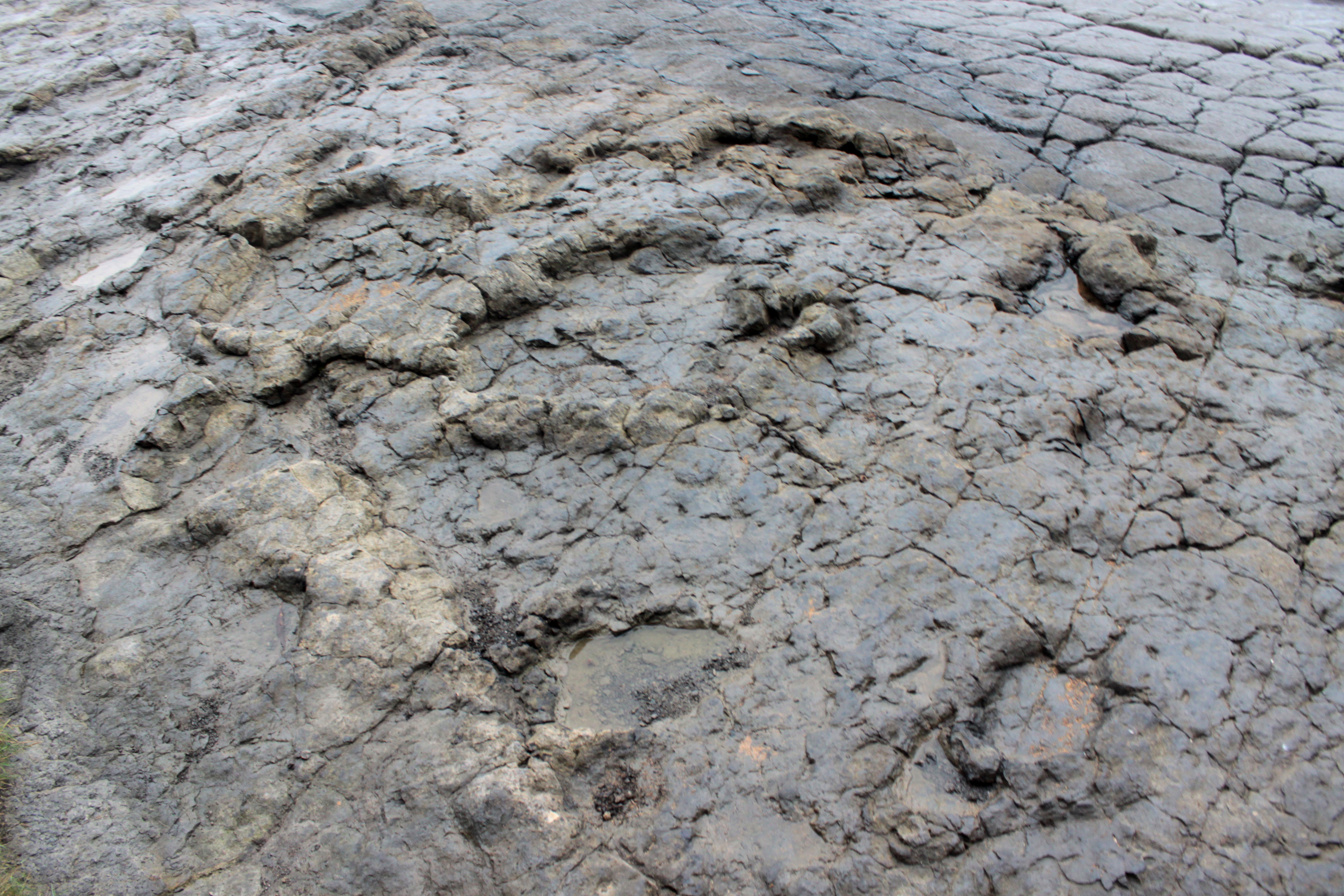 Icnitas de dos saurópodos. A la izquierda Gigandosauropus, de entre 5 y 6 metros de altura hasta la cadera y a la derecha Brontopodus, de aproximadamente 1,80 metros de altura hasta la cadera. Se observa la impresión varias patas delanteras y traseras (Jurásico Superior). Playa de La Griega, Colunga, Asturias, España.